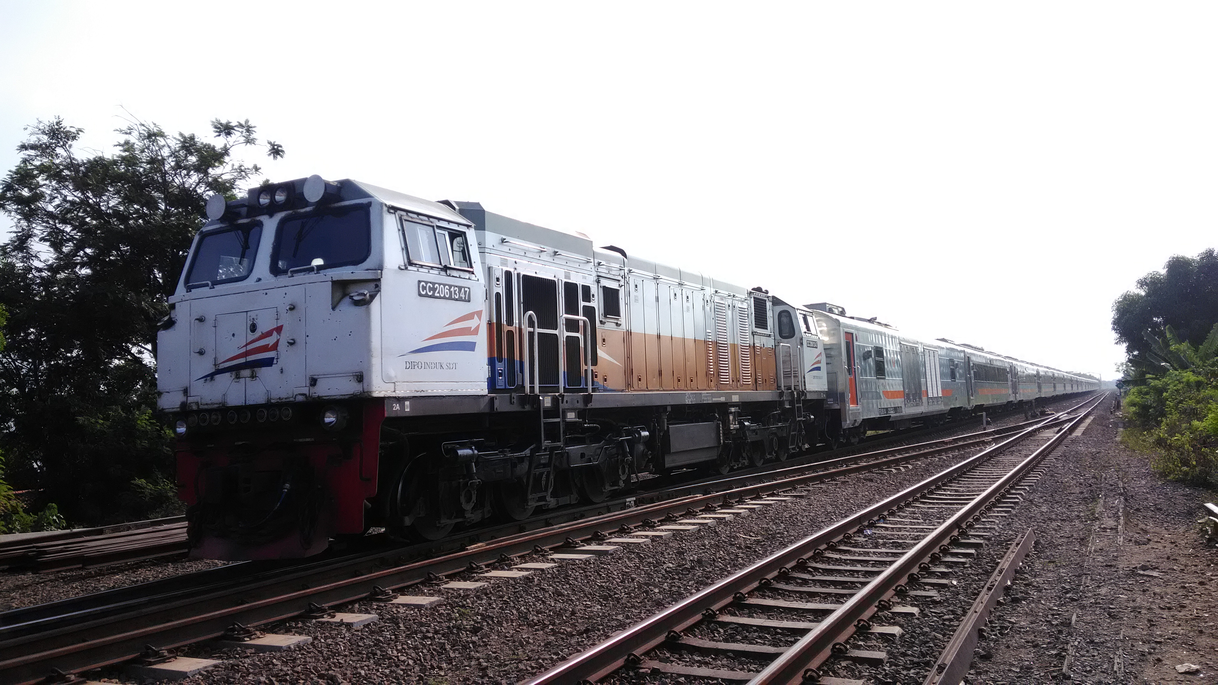 KA Kertajaya Rangkaian Panjang Stainless Steel persiapan melintas langsung Stasiun Cikampek Sunda: KA Kertajaya Rangkéan Panjang Stainless Steel persiapan ngaliwatan Stasion Cikampék